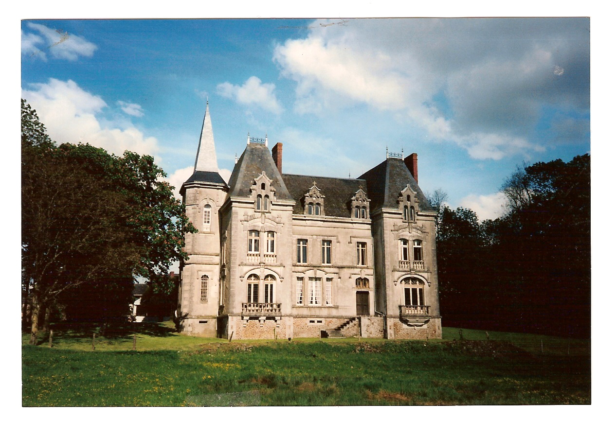 Facade avant Château du Grand Coudray, Villaines-la-Juhel en Mayenne (53700)